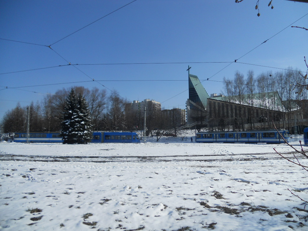 Kościół św. Maksymiliana Kolbego na Mistrzejowicach w Krakowie.